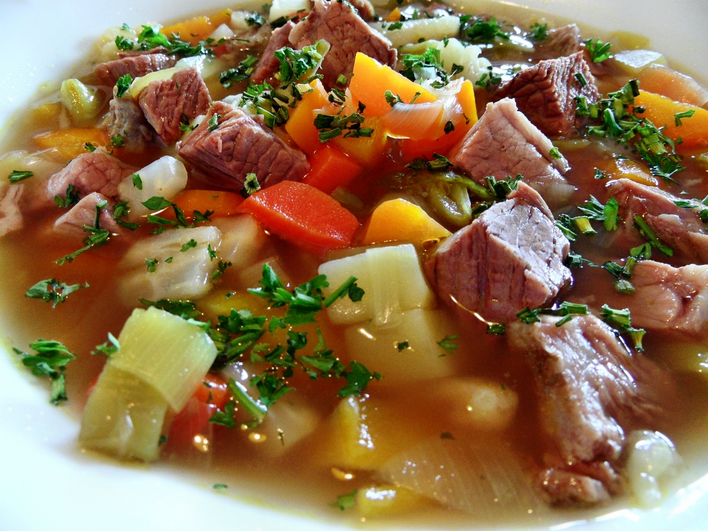 Ab und an darf es auch mal ein Eintopf sein, so wie in diesem Fall ein kräftiger Pichelsteiner.